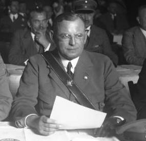 Die grosse Kundgebung für das Volksbegehren im Sportpalast in Berlin ! Das Präsidium des Reichs-Ausschusses für das Volksbegehren Seldte, der Führer der Gründer des Stahlhelms während der Kundgebung für das Volksbegehren im Sportpalast in Berlin. [Text Bild 102-08444]